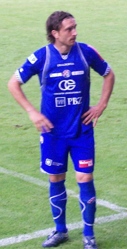 Tomislav Šokota